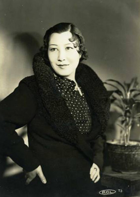 ブロマイド（1930年当時）